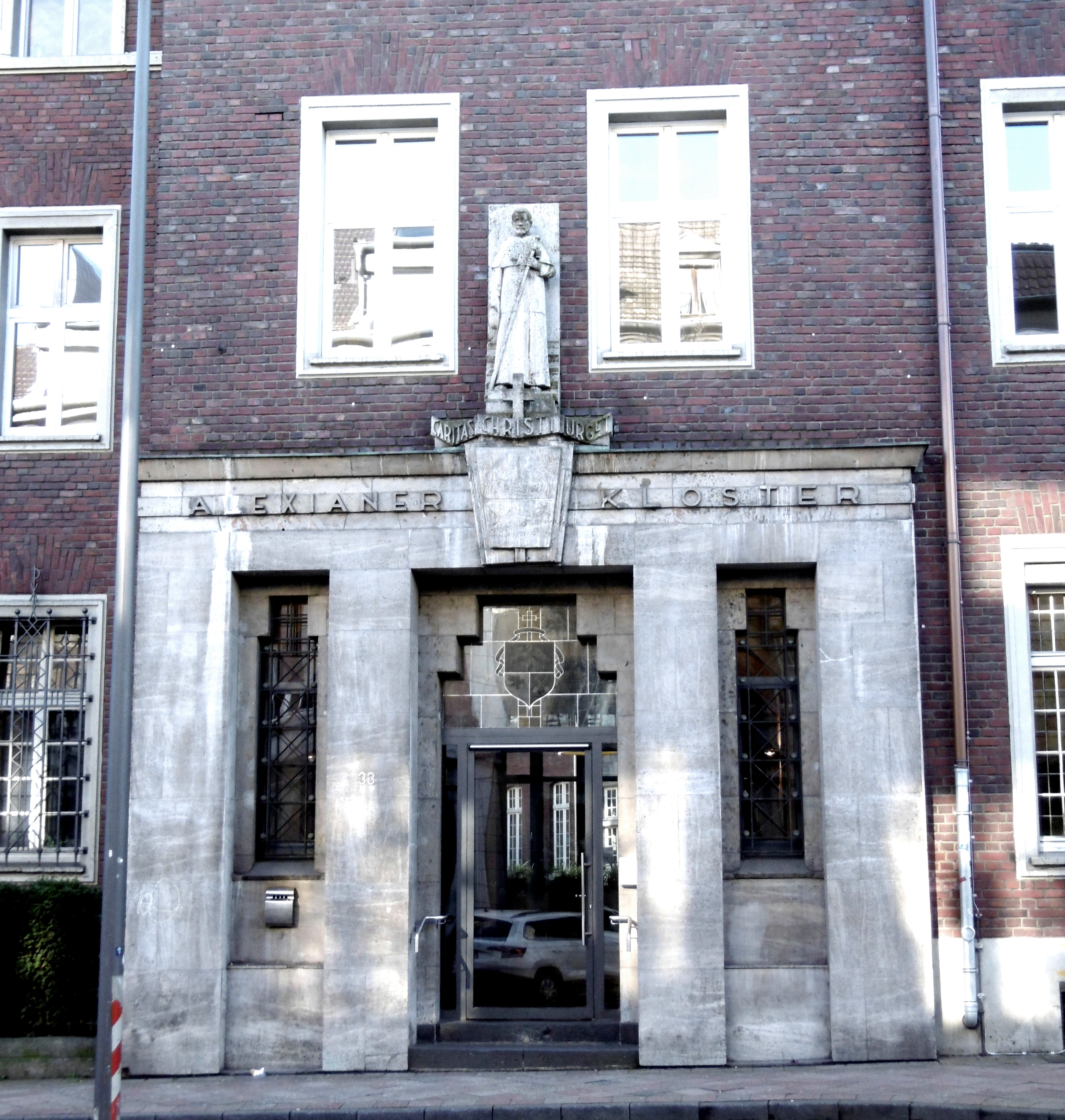 Haupteingang Alexianerkloster Aachen